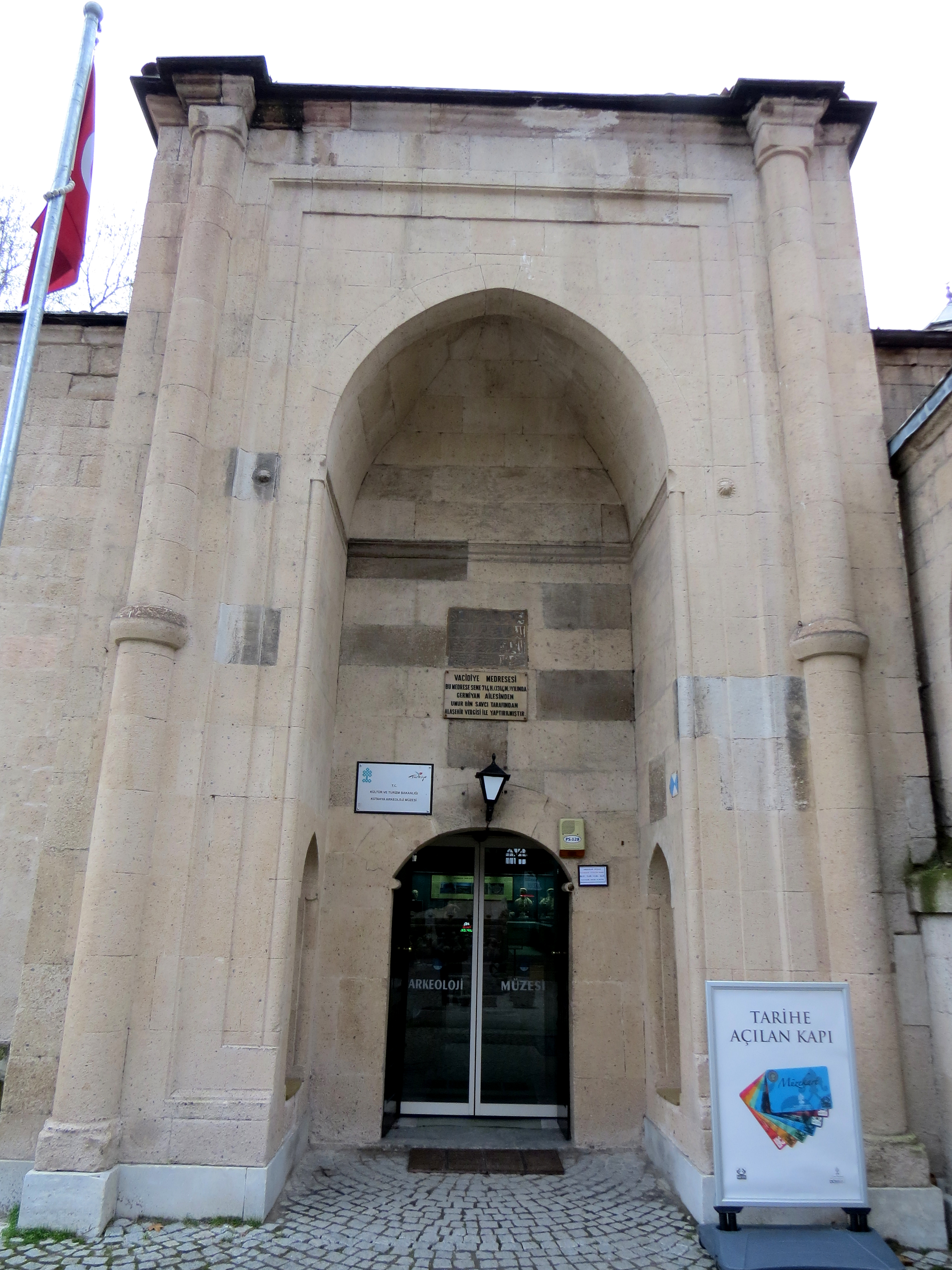 Vacidiye Medresesi, Kütahya.